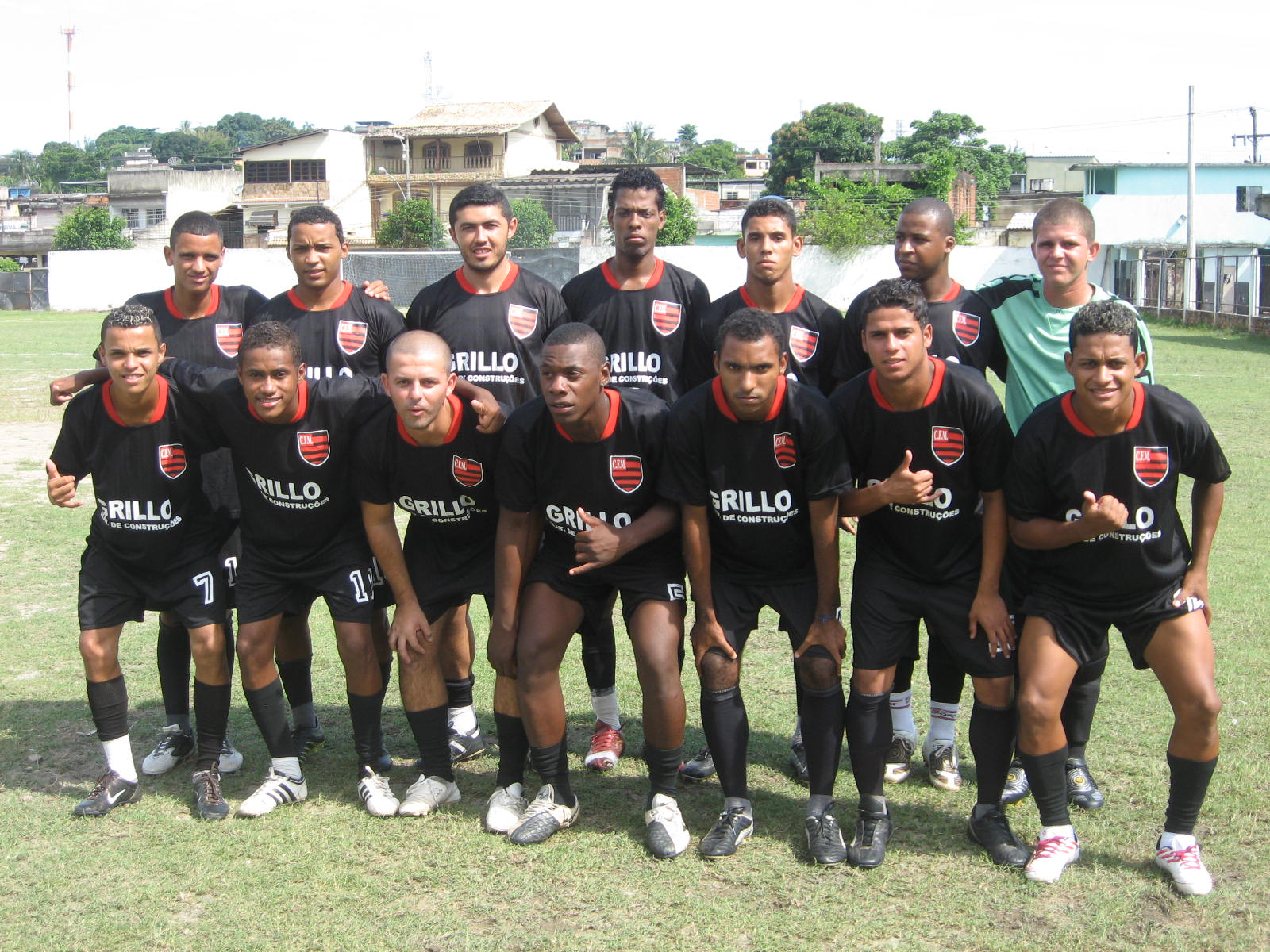 Equipe do Centro de Futebol Mesquita (CFM) em 2010 na disputa do Torneio de Verão, da Liga Desportiva de Nova Iguaçu.